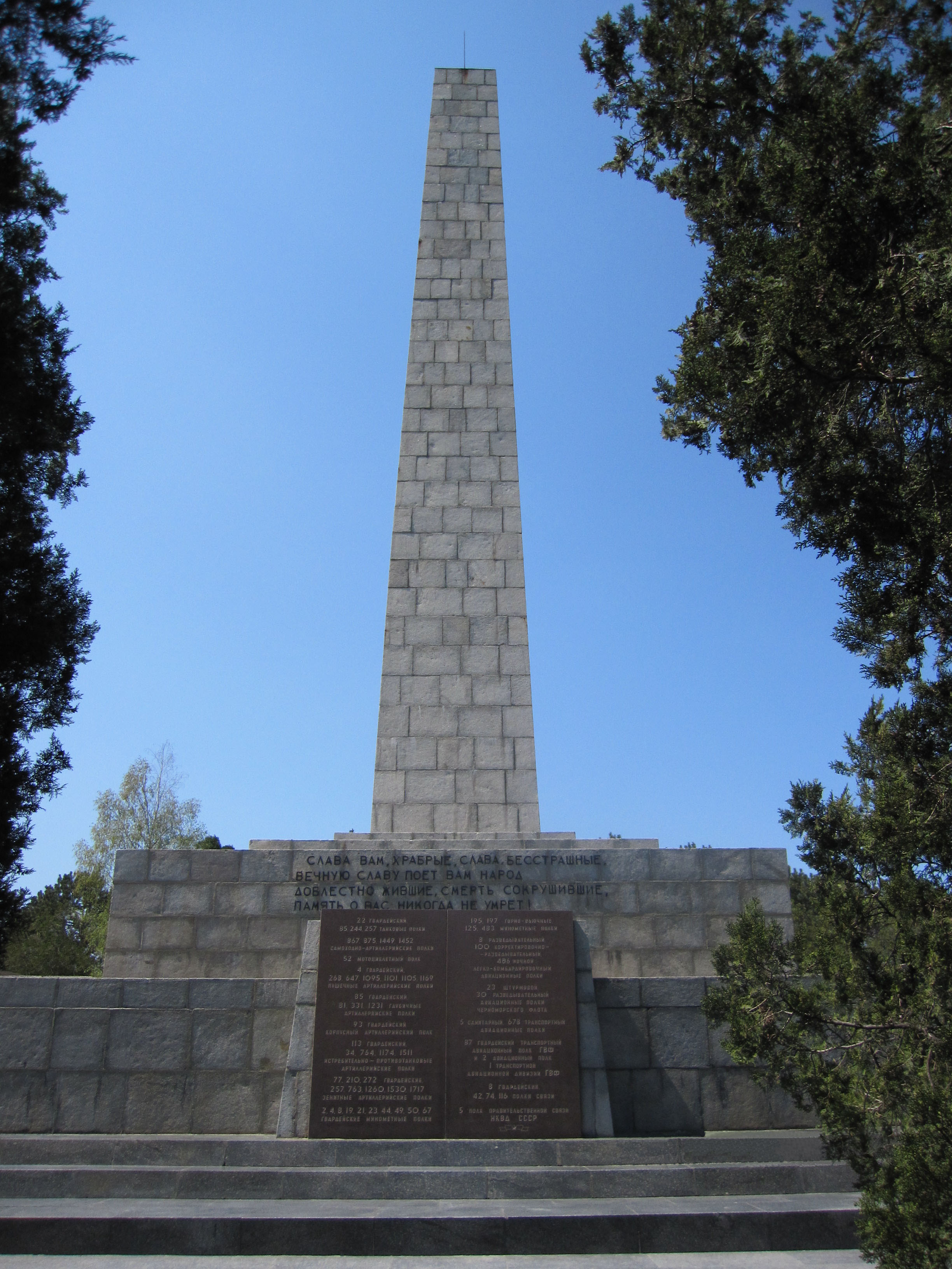 Пам’ятник Слави воїнам-визволителям, 1944, Севастополь, Сапун-гора